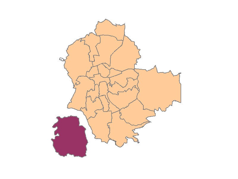 plans de saint-etienne Quartier de Saint-Victor